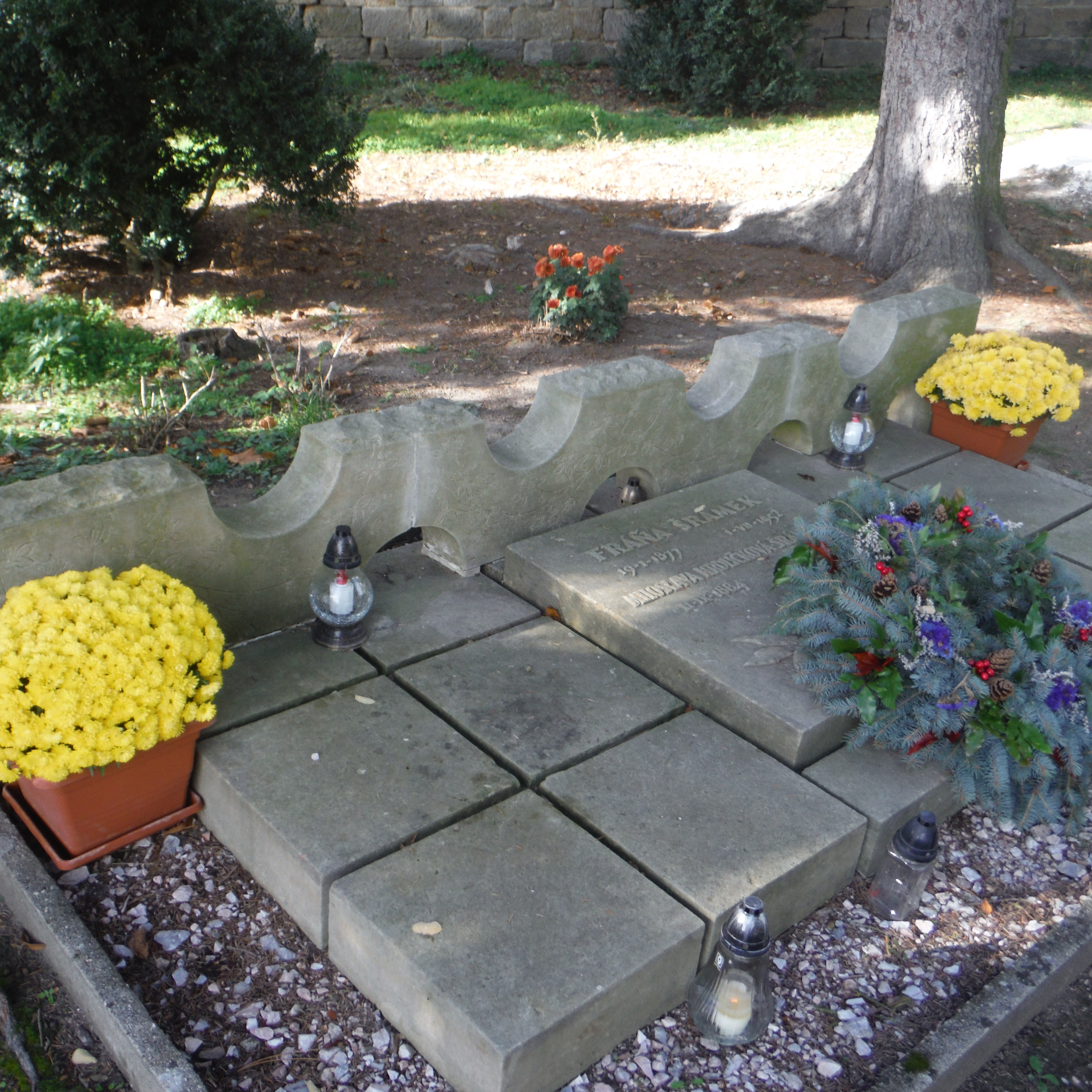 hrob